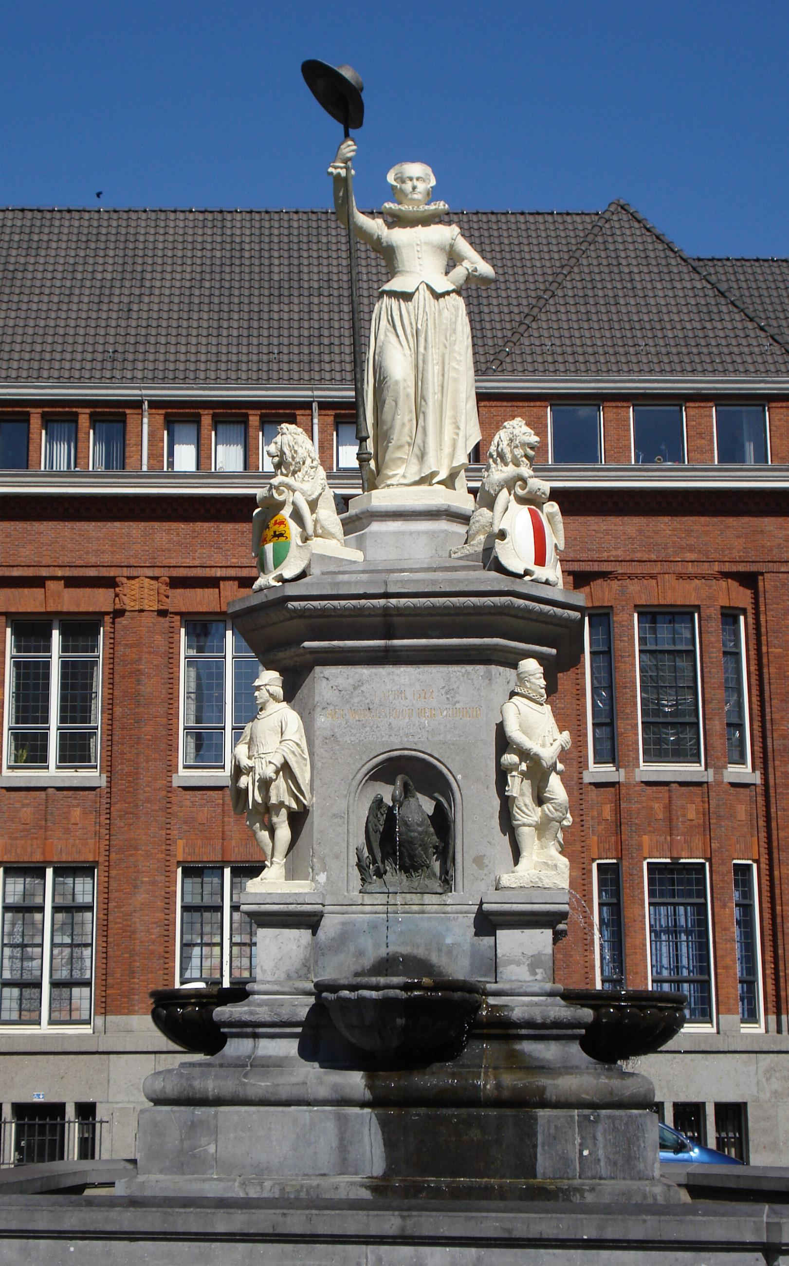 Rotterdam, Nieuwe Markt. Standbeeld Maagd van Holland.